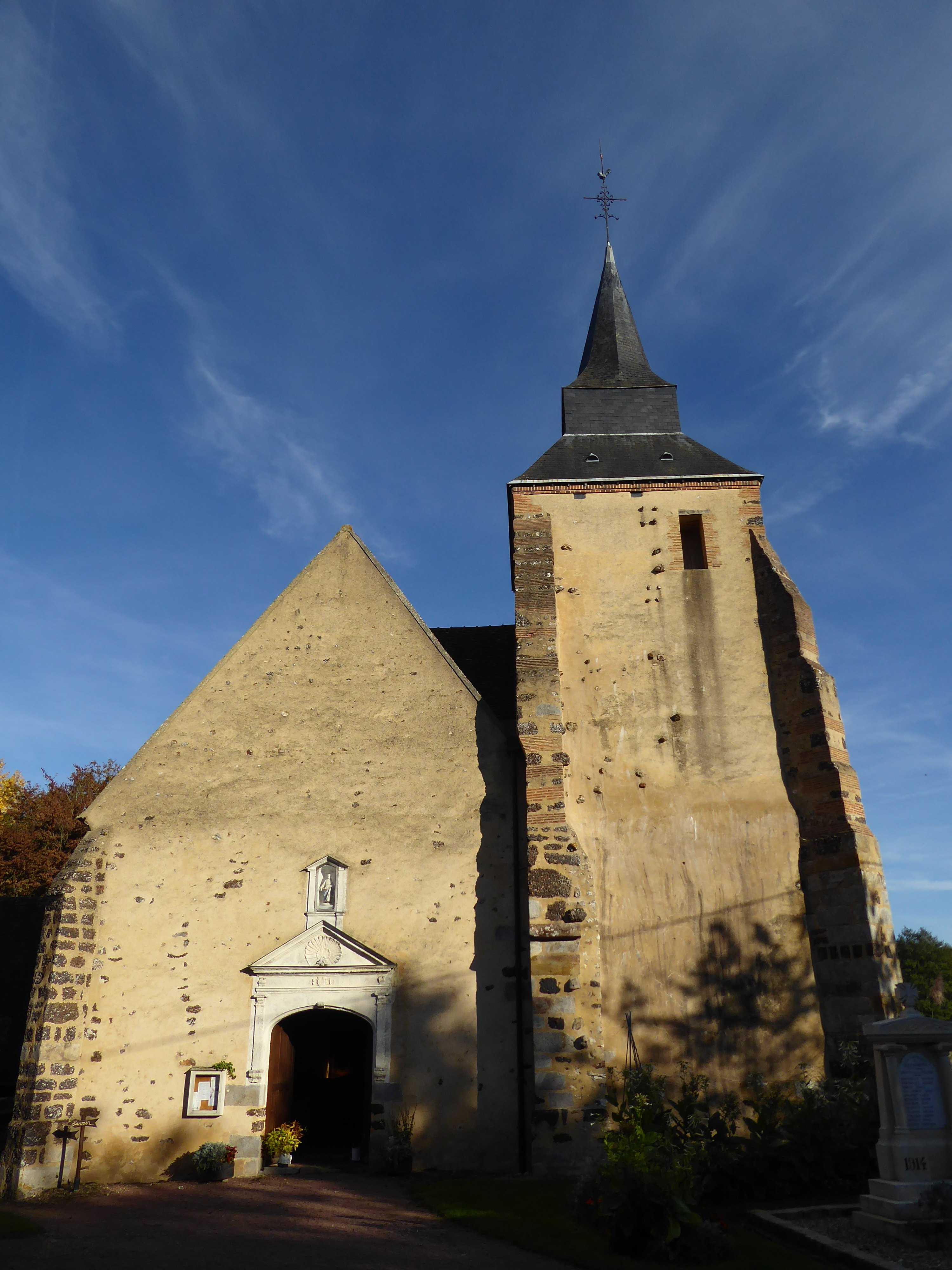 Façade et clocher de l'église Notre-Dame des Ressuintes, en Eure-et-Loir.